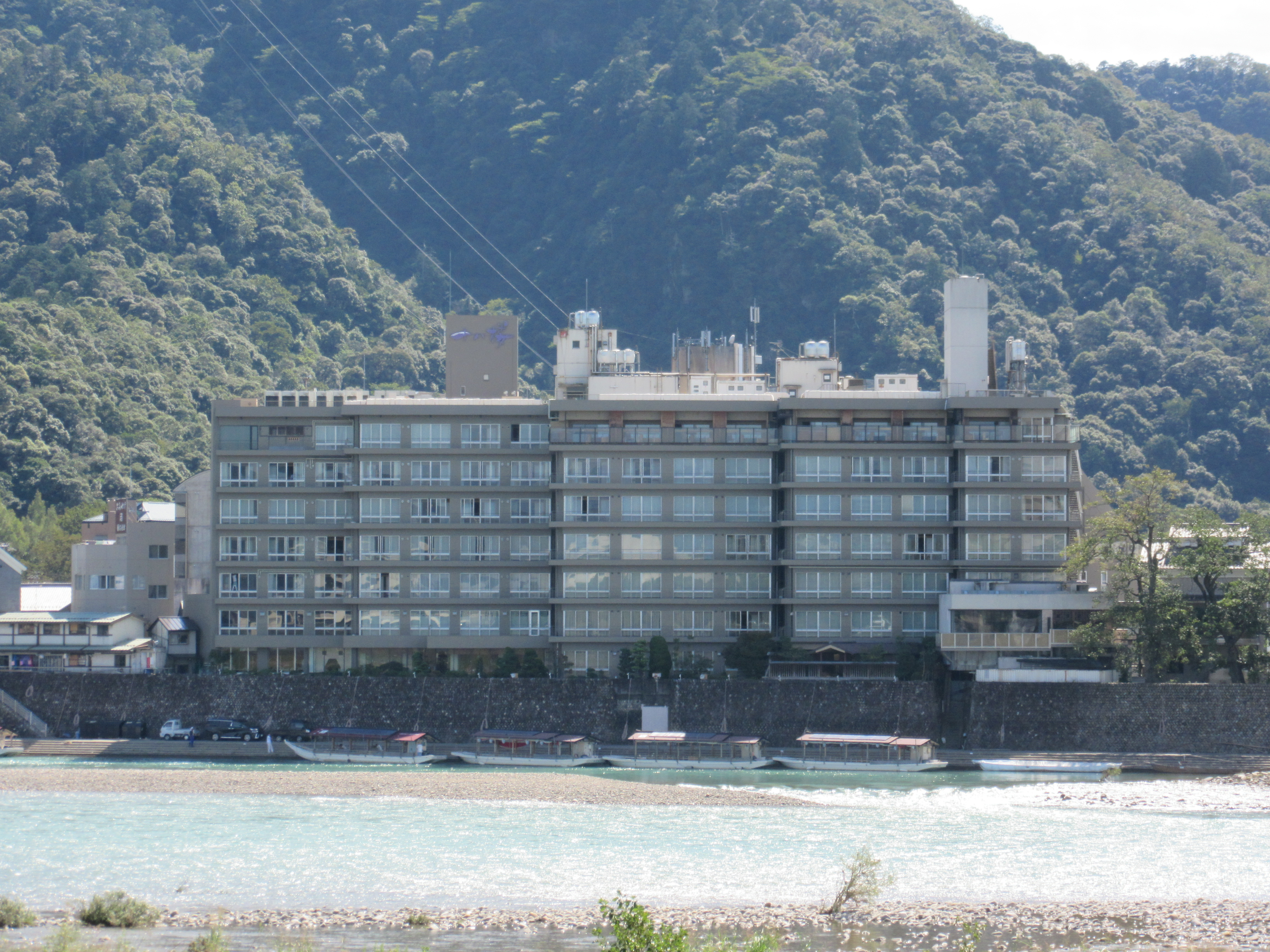 十八楼旅館